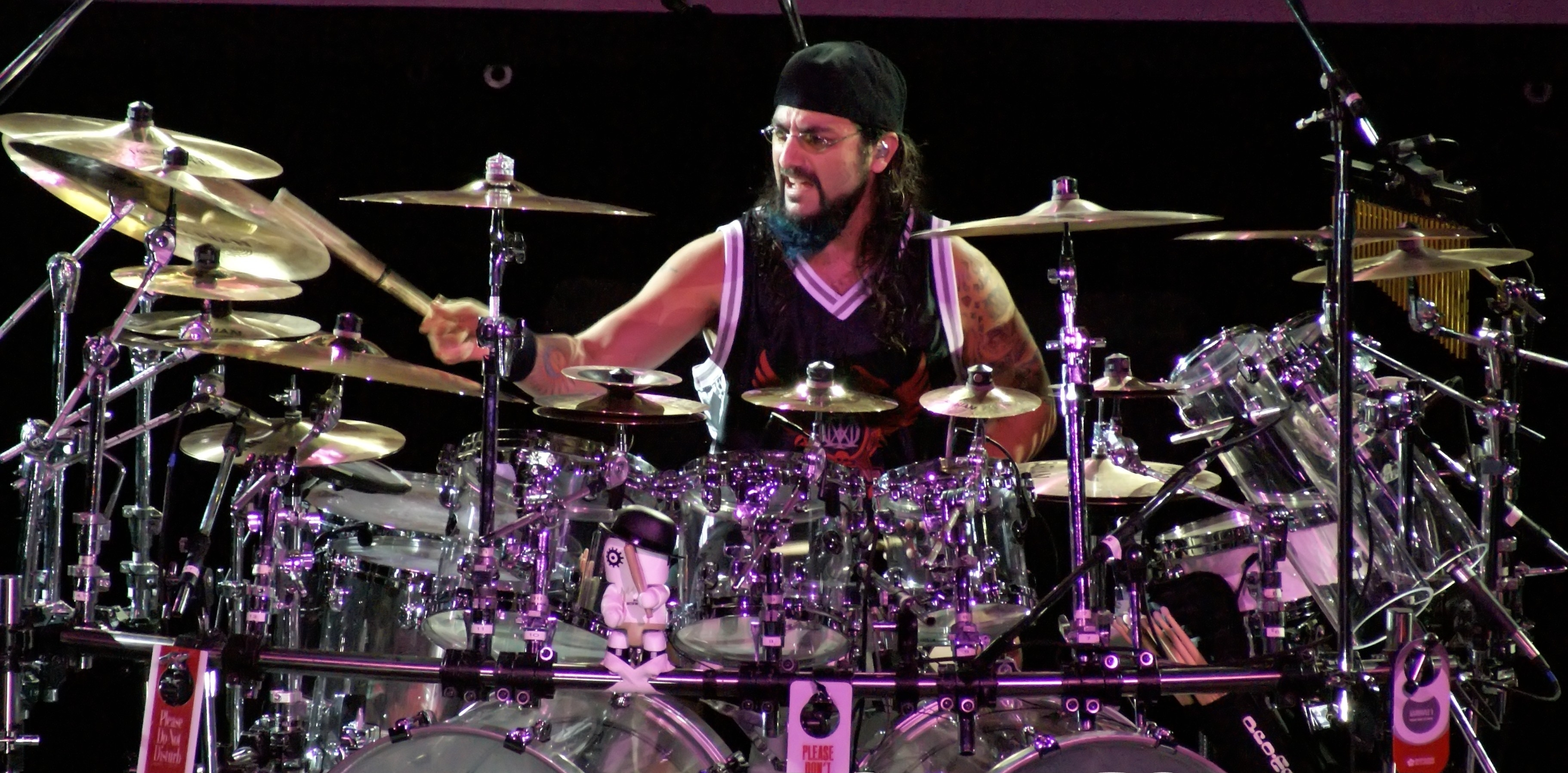 Mike Portnoy. Show Dream Theater no Rio de Janeiro dia 07/03/2008 Fotos tiradas do camarote central.